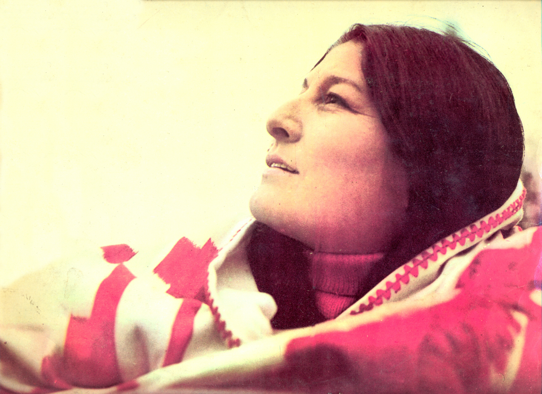 Fotografía de la cantante argentina Mercedes Sosa perteneciente al disco "Hasta la victoria" editado en Argentina en 1972.